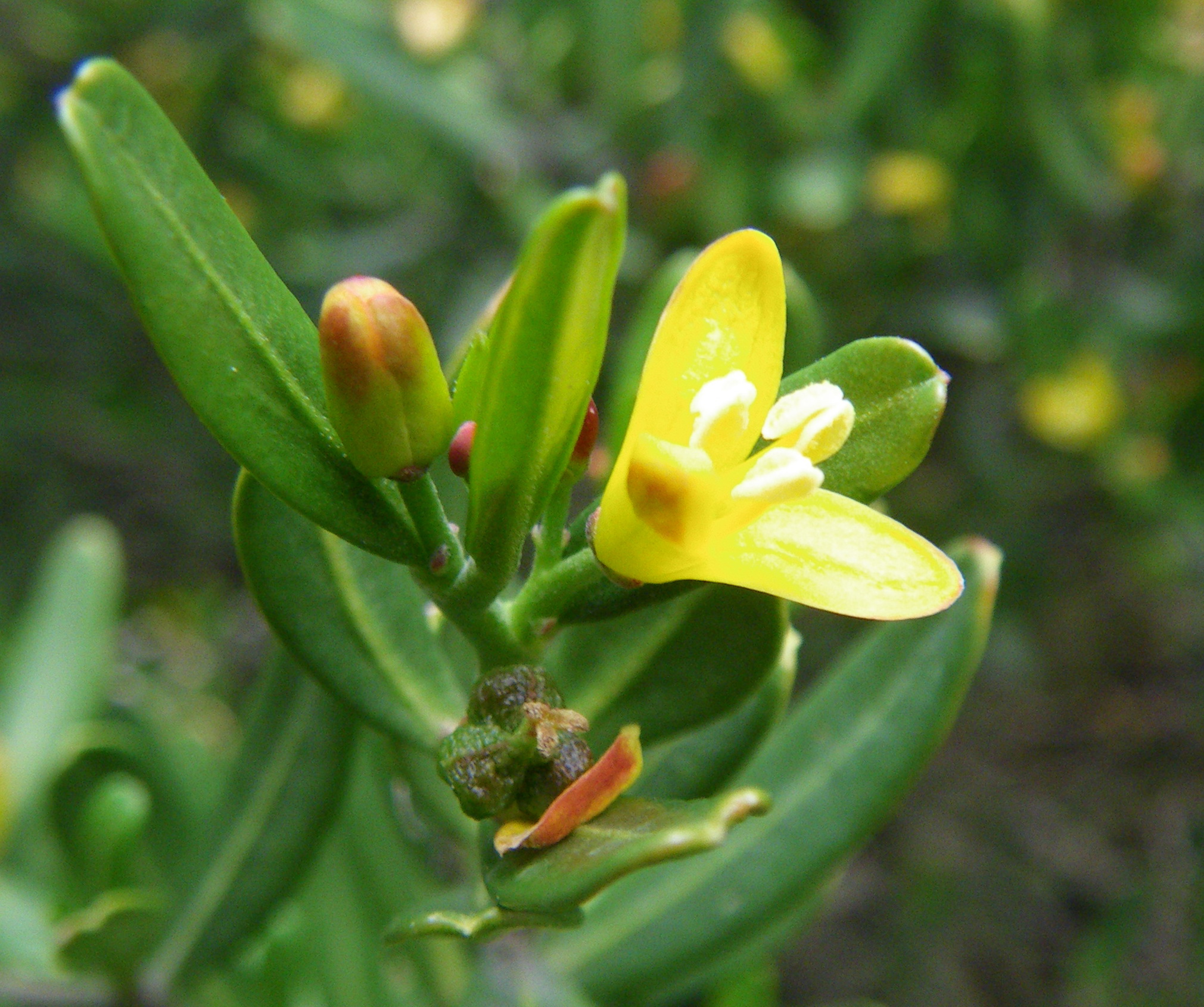 Cneorum tricoccon. Real Jardín Botánico, Madrid, España.